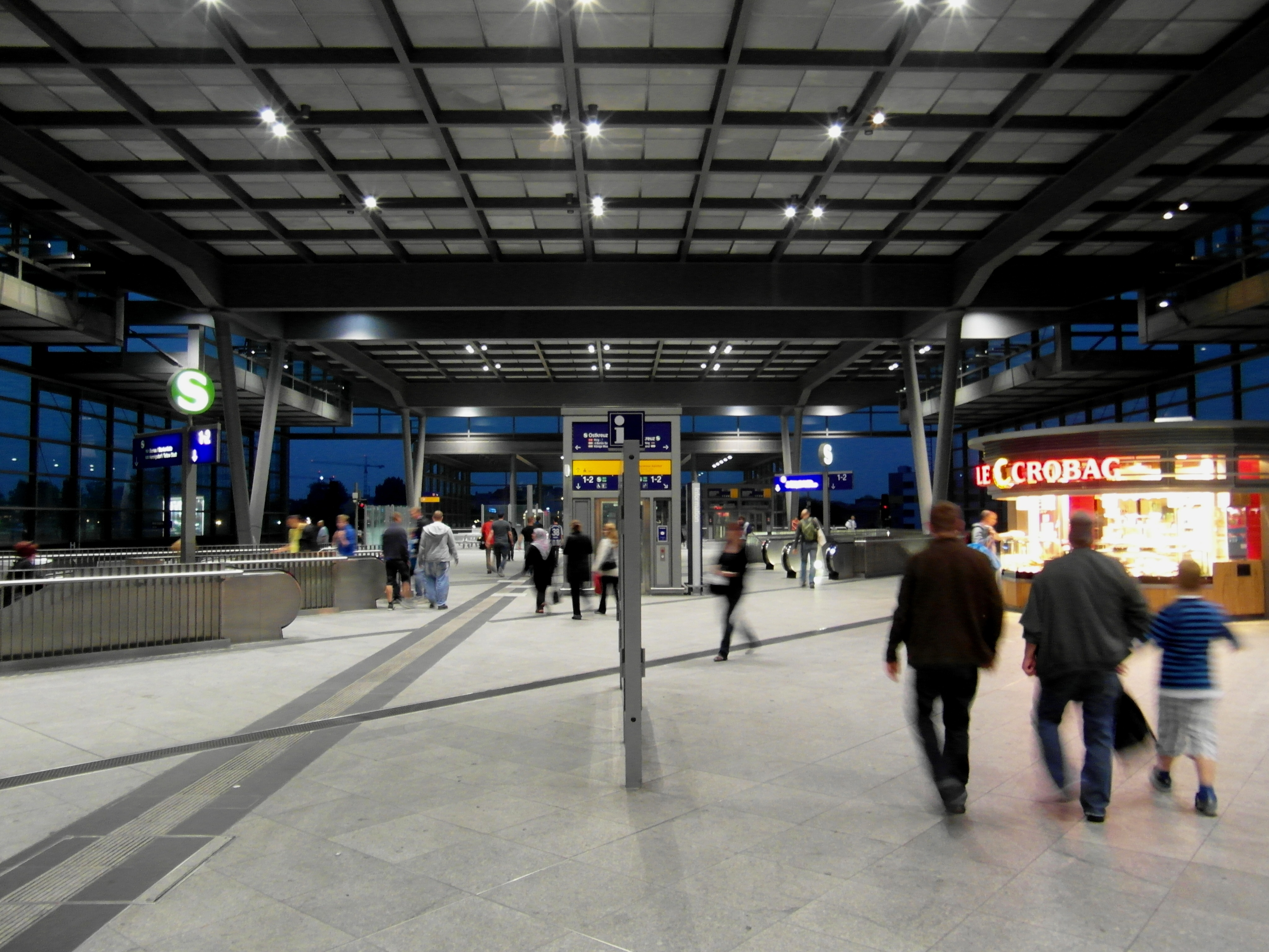 Berlin - Bahnhof Südkreuz